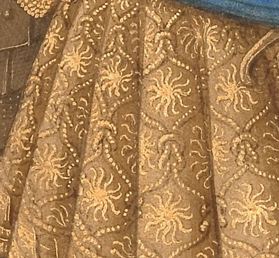 Heures Louis XII Louis XII priant (détaii) - Robe constellée de soleils en or pur